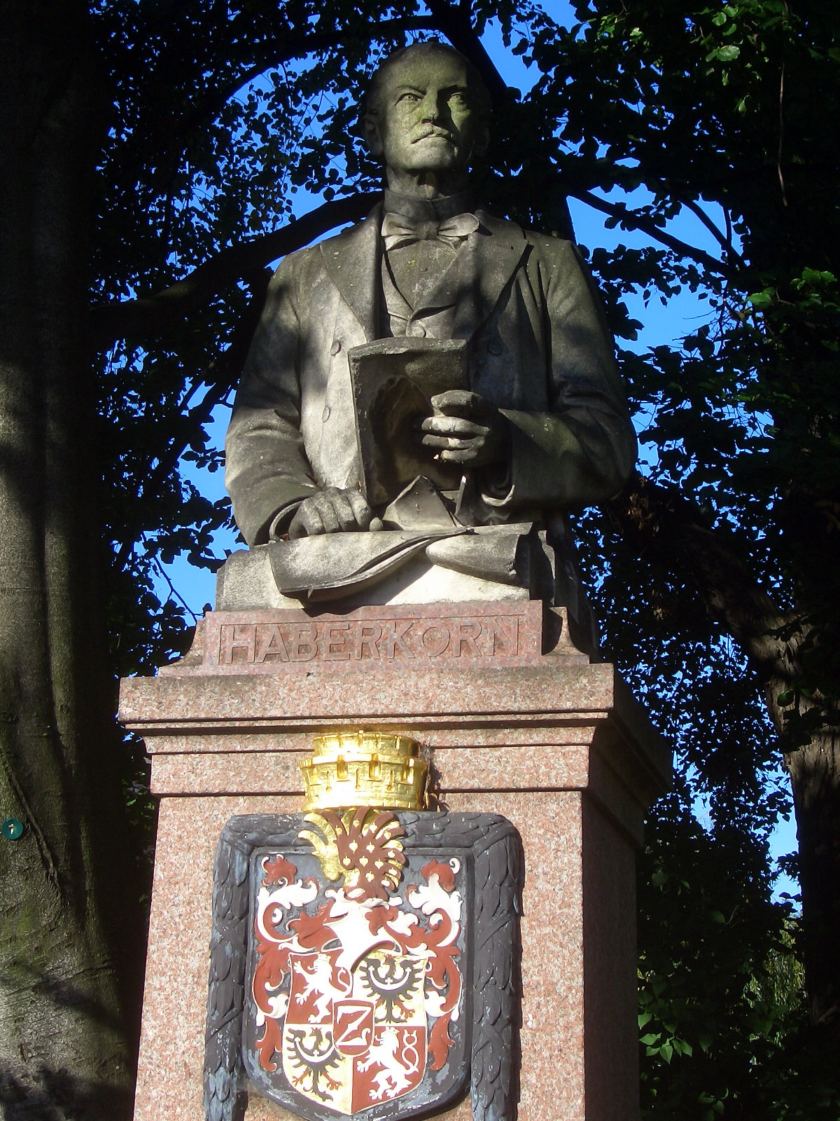 Denkmal von Ludwig Haberkorn (1811-1901) von 1857 bis 1886 Bürgermeister von Zittau.